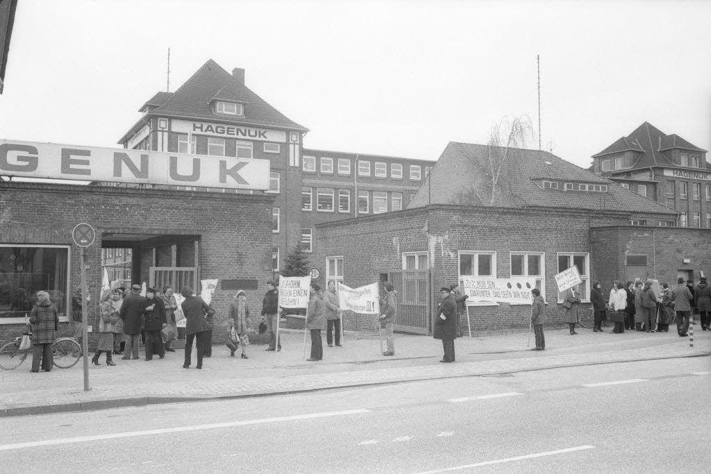 Protestzug der Hagenuk-Mitarbeiter vor dem Firmensitz am Westring 431-451.